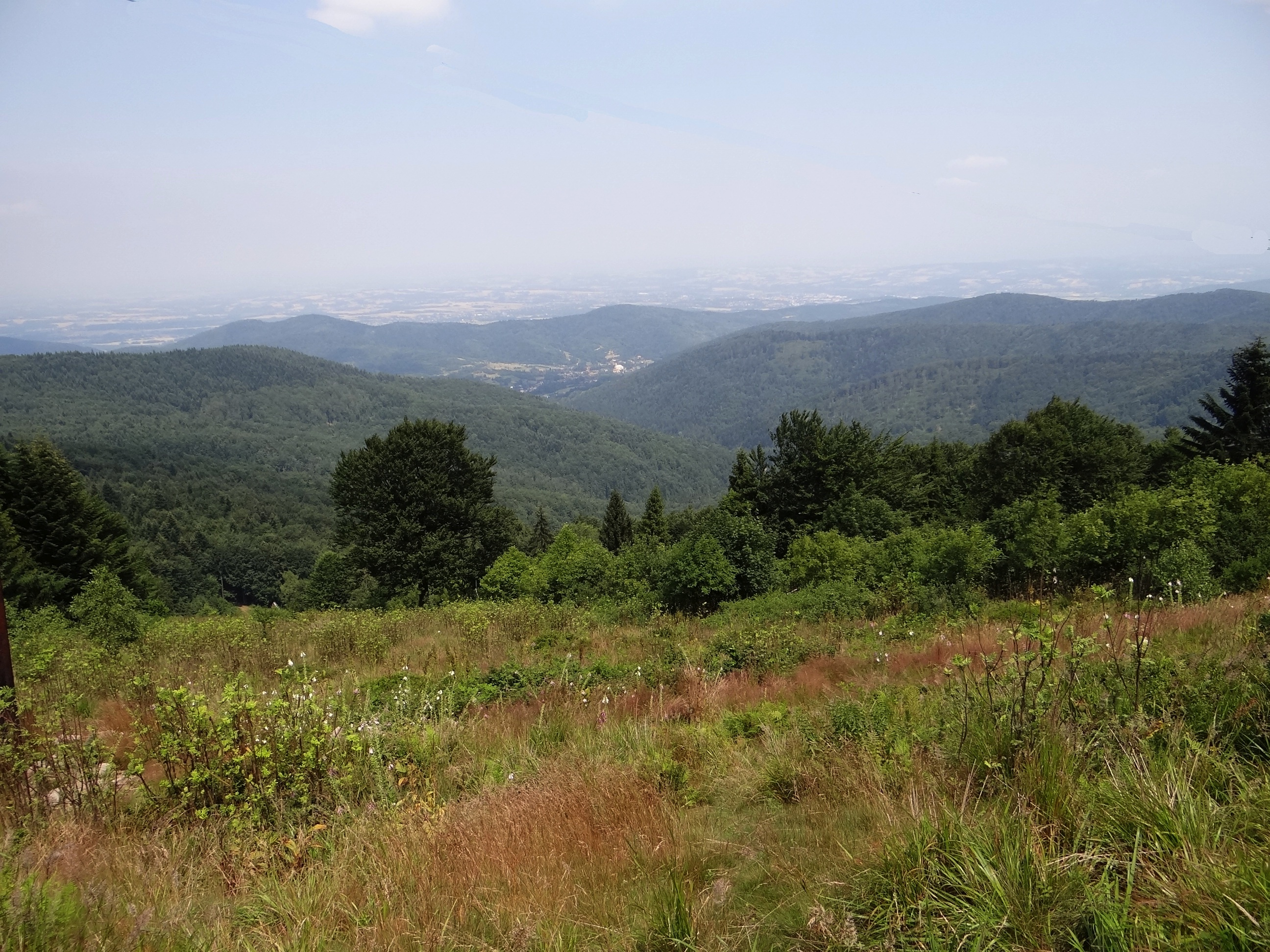 Polana Beskid na Groniu Jana Pawła II